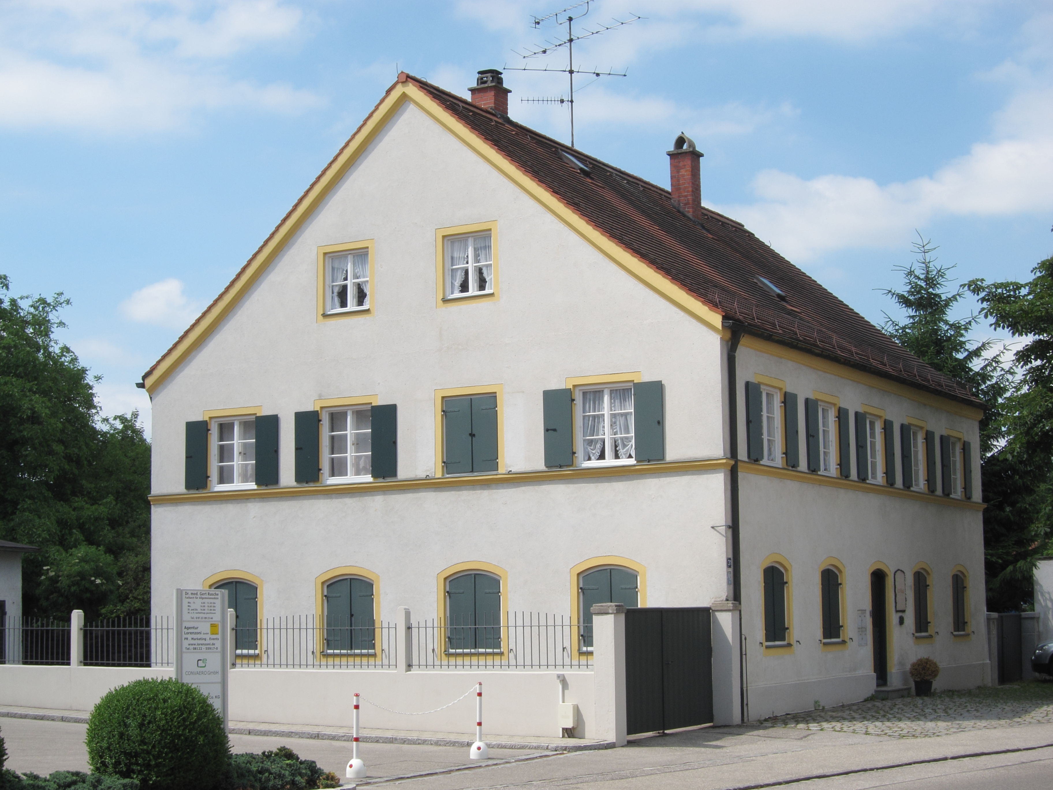 Landshuter Str. 31; Geburts- und Atelierhaus des Tiermalers Franz Xaver Stahl (1901-1977), zweigeschossiges biedermeierliches Vorstadthaus mit Satteldach, um 1840.